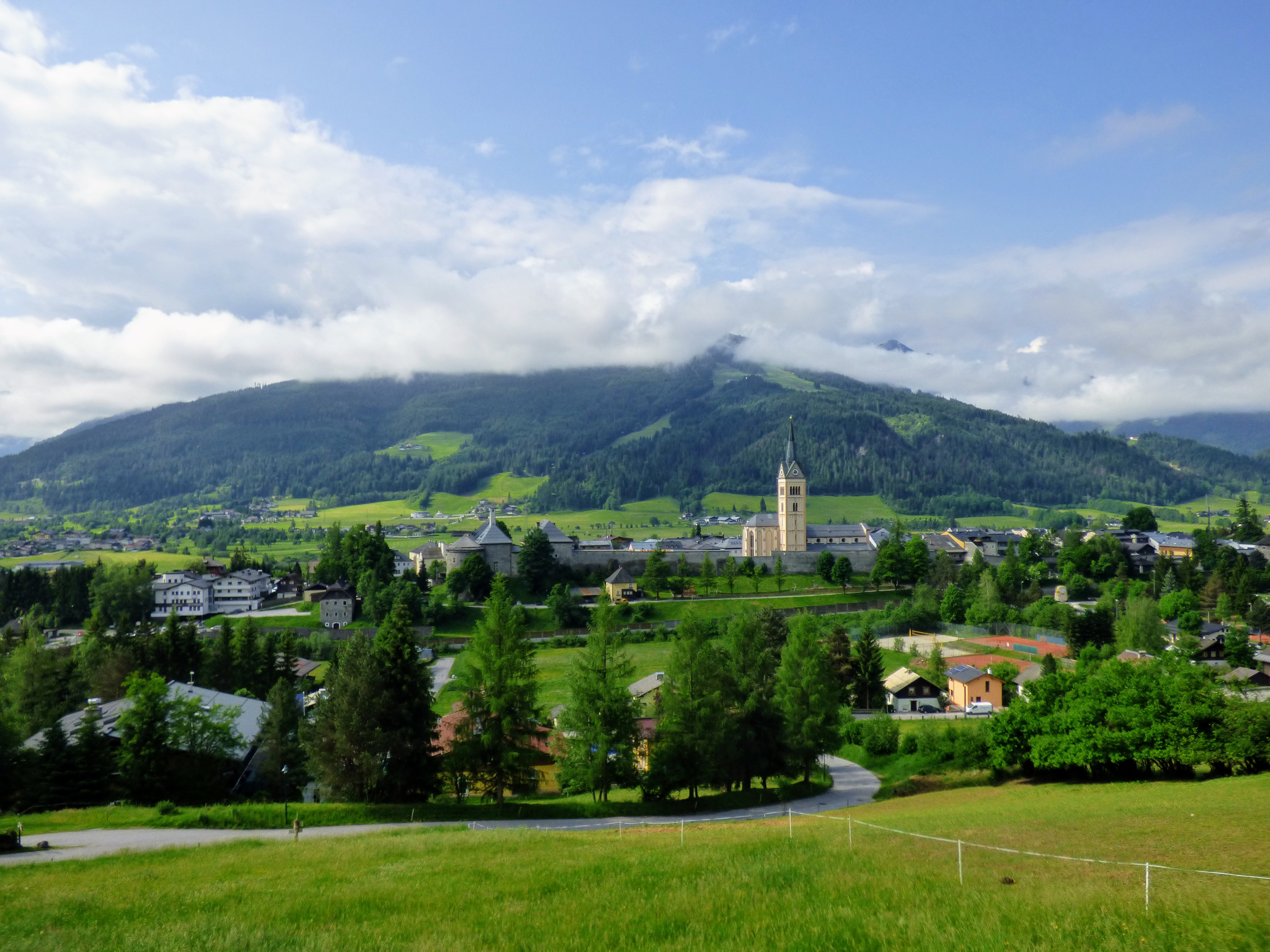 Blick auf Radstadt (Bundesland Salzburg)